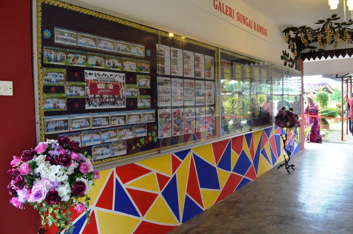 gambar warga sekolah dan aktiviti sekolah